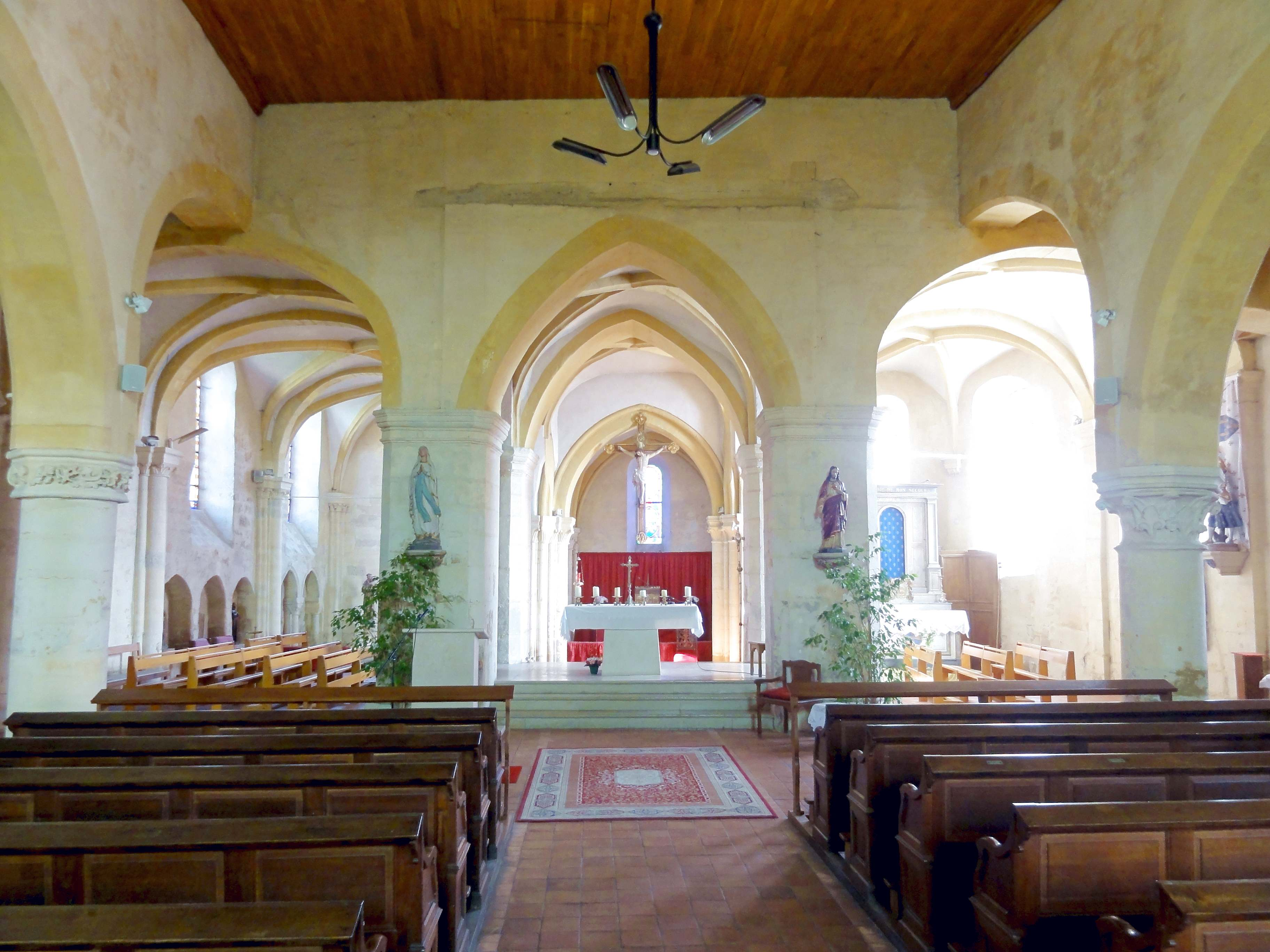 Intérieur de l'église - voir titre.